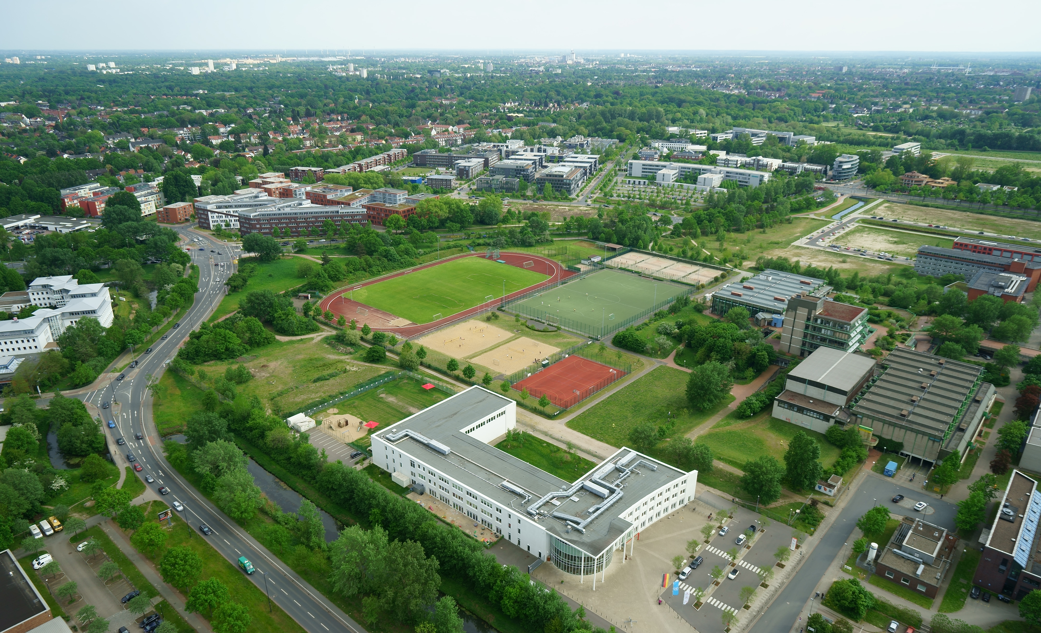 Standort: Fallturm des ZARM in Bremen, Fallturmspitze/Besucherebene (130 Meter): Technologiepark Bremen - ISB International School of Bremen am Hochschulring - Universität Bremen - Horn-Lehe